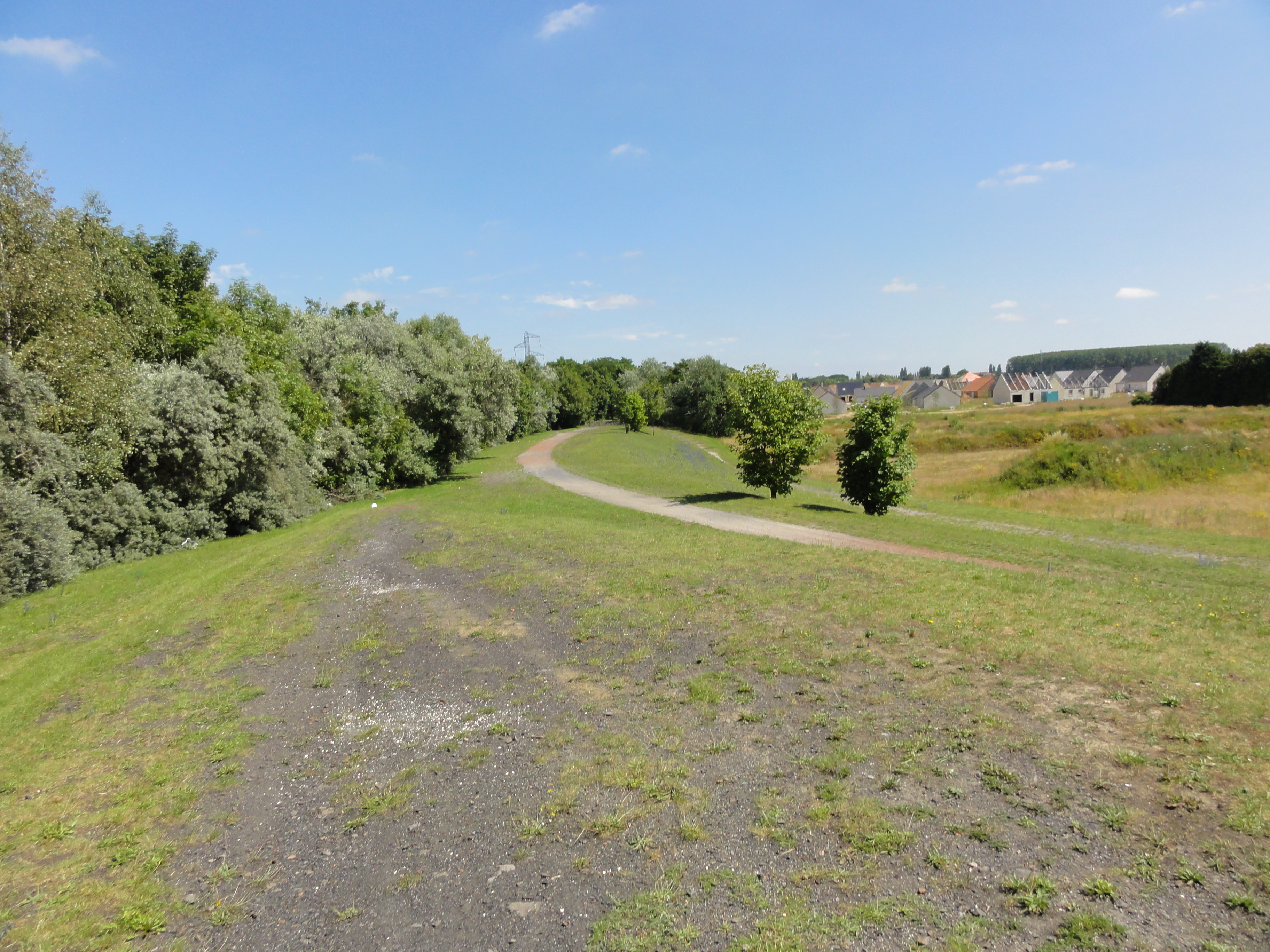 Terril n° 209 dit Cavalier de Noyelles-Godault, près de la fosse n° 4 - 4 bis de la Compagnie des mines de Dourges dans le bassin minier du Nord-Pas-de-Calais, Courcelles-lès-Lens et Noyelles-Godault, Pas-de-Calais, Nord-Pas-de-Calais, France.